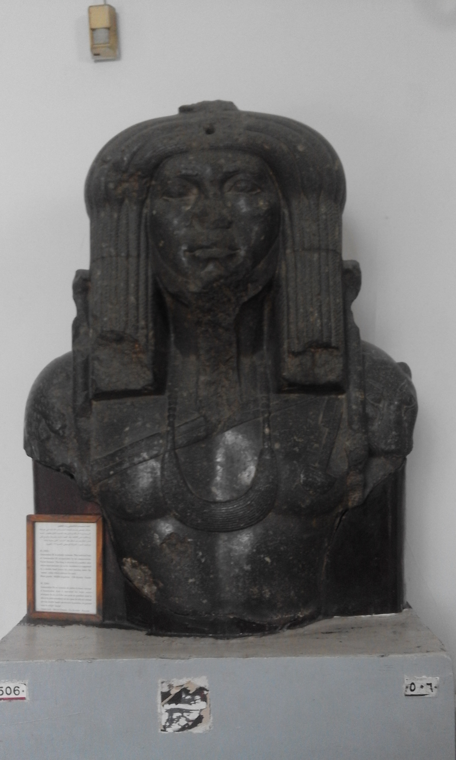 صورة لتمثال الملك أمنمحات الثالث في المتحف المصري